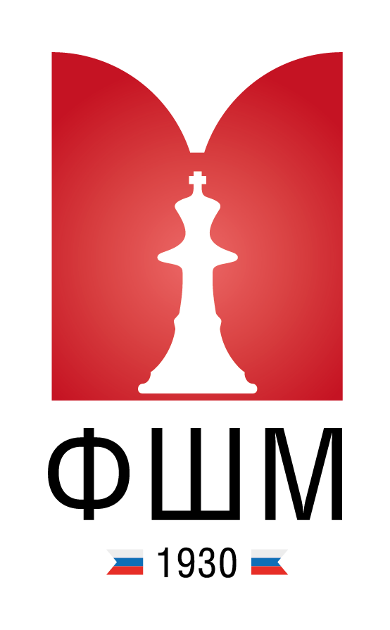 Измененный логотип шахматной федерации Москвы, подтверждение можете посмотреть на сайте федерации